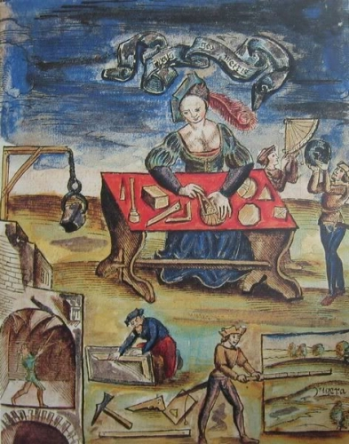 Hier wird schöpferisch gestaltet mit Hilfe von Werkzeugen, Mess- und Schreibgeräten (aquarellierter Holzschnitt)